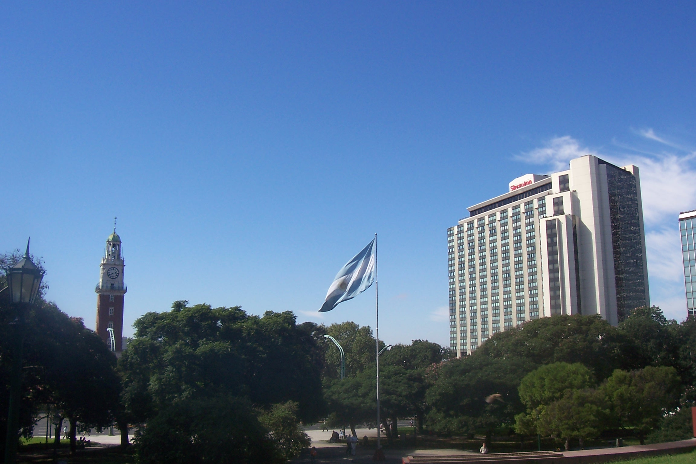 Foto tomada desde la plaza San Martín del barrio de Retiro, en Buenos Aires. Se observan la Torre Monumental (antigua Torre de los Ingleses) (izquierda) y el hotel Sheraton (derecha).